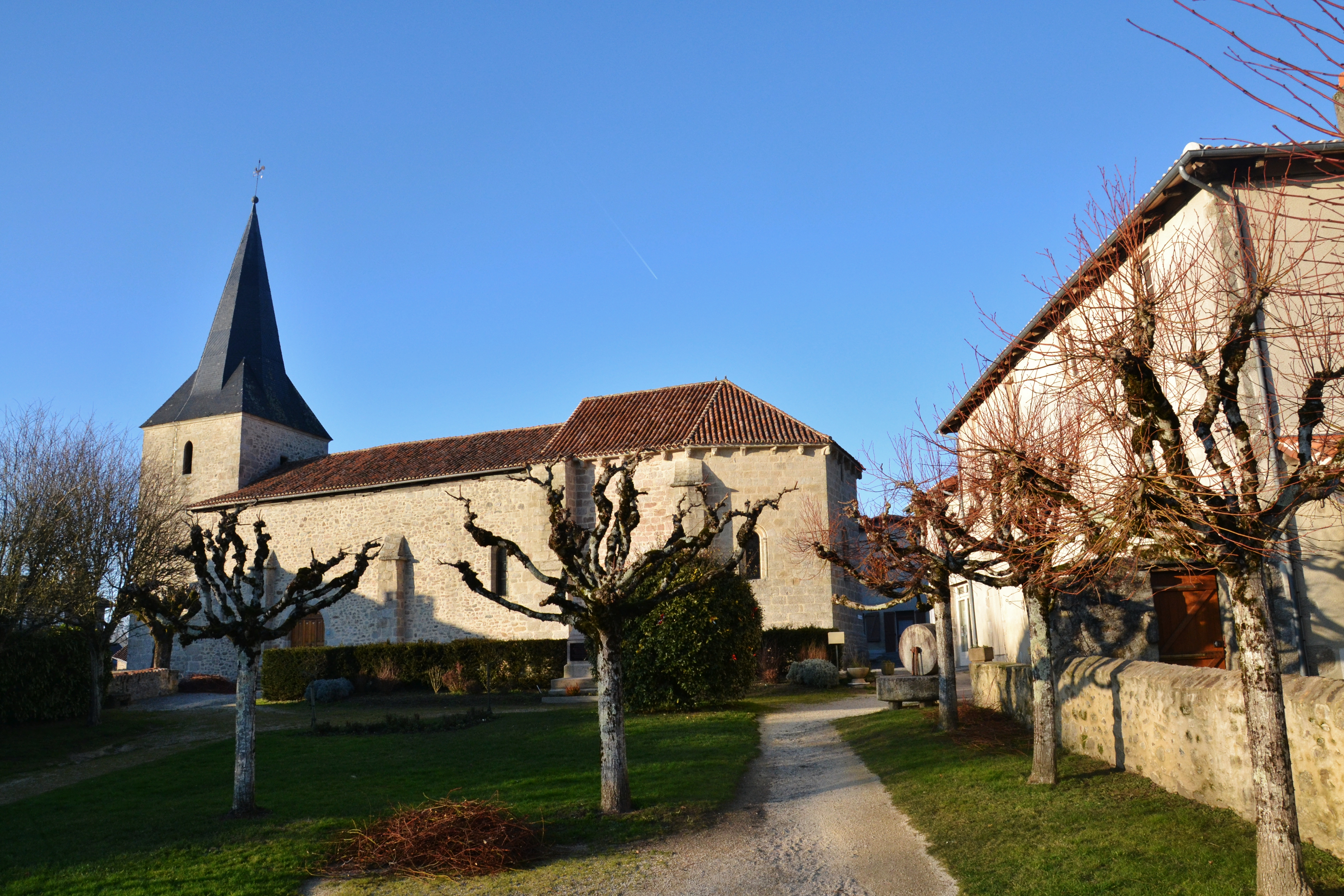 L'église et la mairie de Javerdat (Haute-Vienne, France)